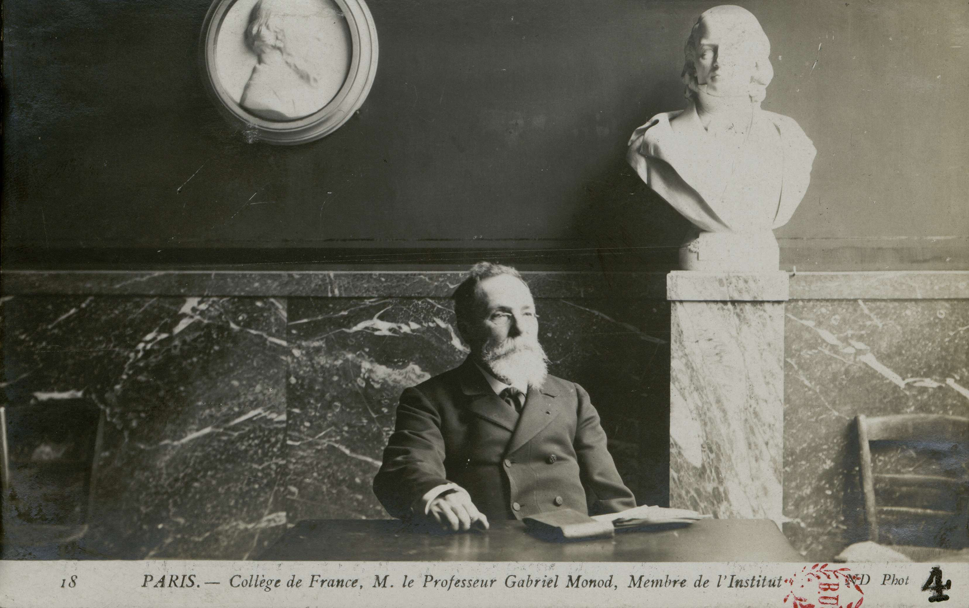 Carte postale photographique